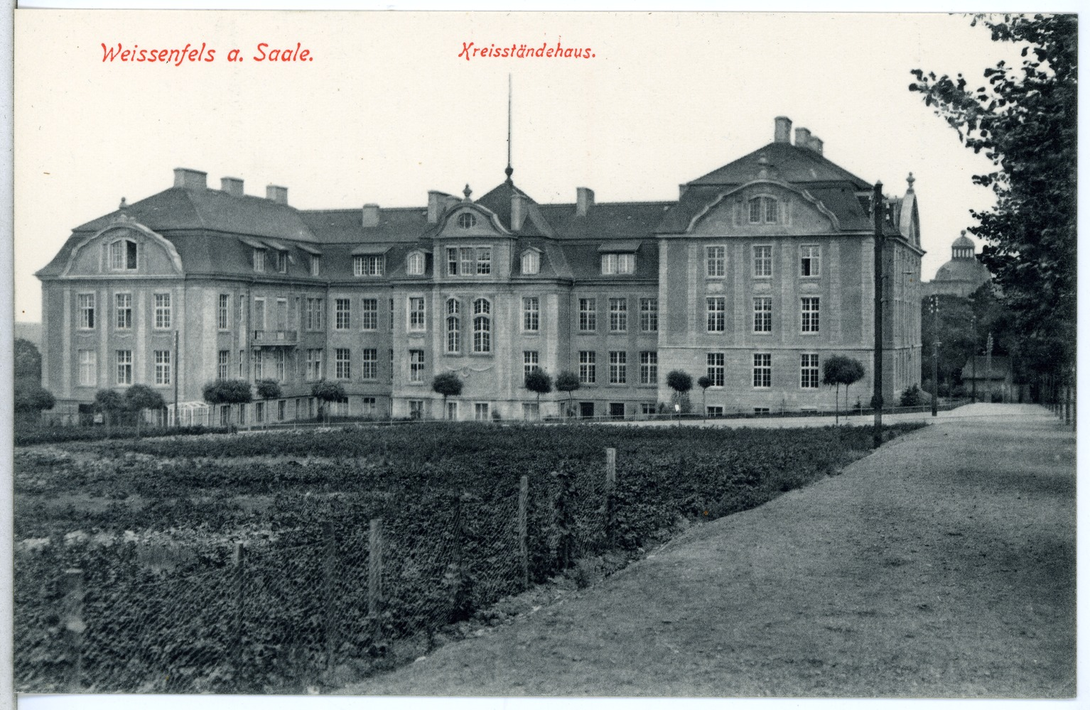 Weißenfels; Kreisständehaus (später Landratsamt, heute Nebenstelle der Kreisverwaltung des Burgenlandkreises), Am Stadtpark 6 This postcard is from publisher Brück & Sohn in Meißen ( postcard has a unique number 13913 and is available in a higher resolution at the publisher. This images was uploaded in a cooperation project between Wikipedians and the publisher.